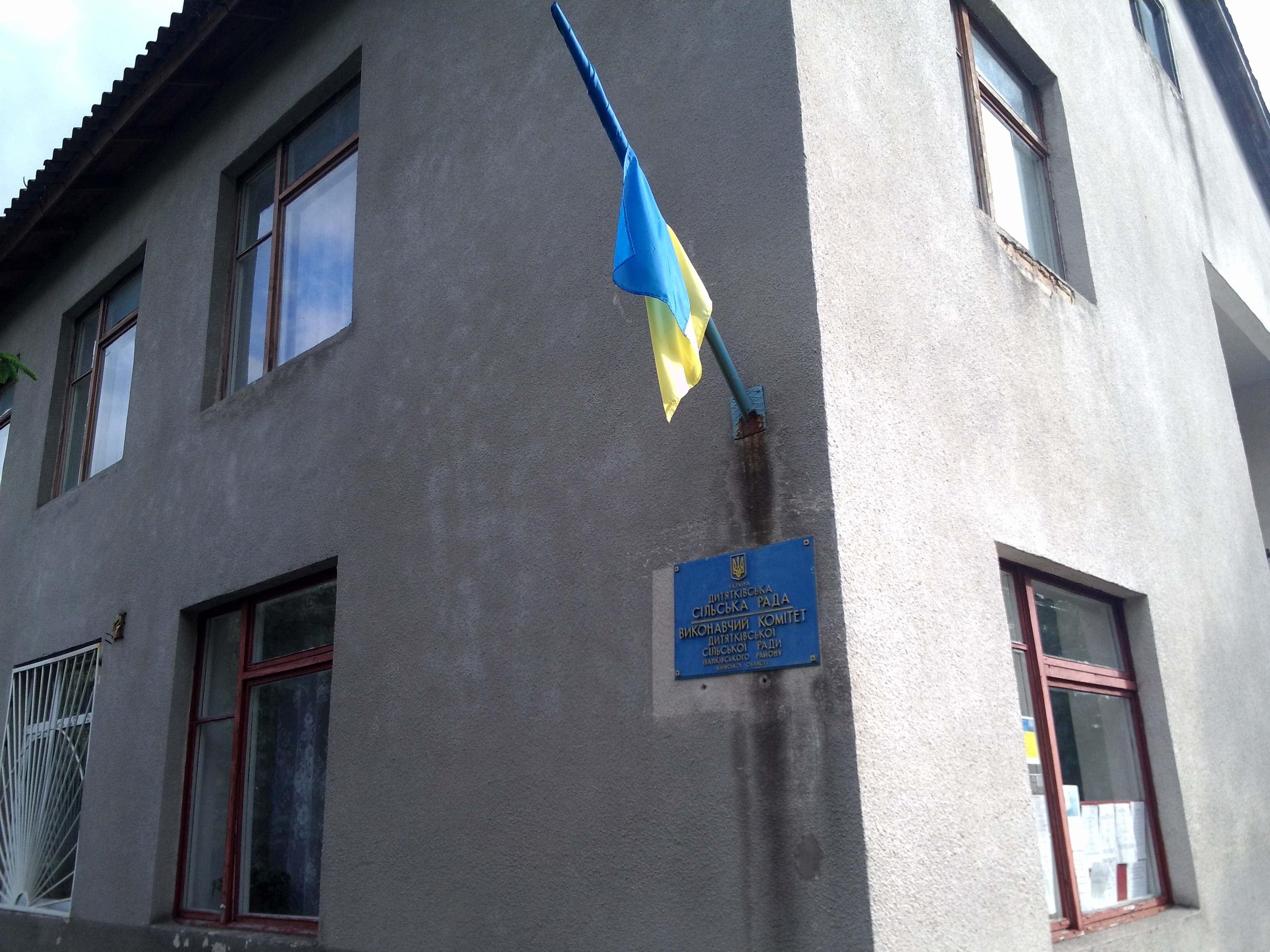 Дитятківська сільська рада